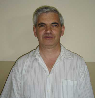 Sreto Balaš, slikar iz Karanca